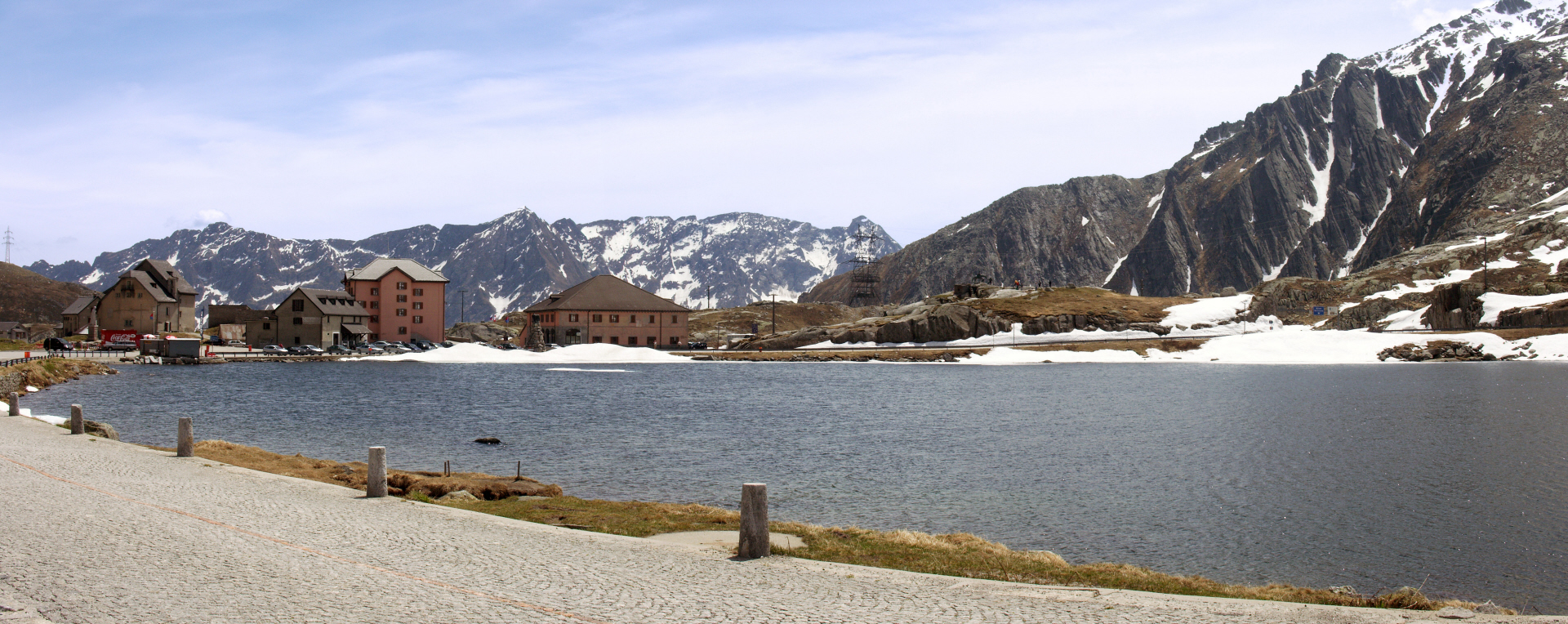 St. Gotthard Pass, Lago della Piazza